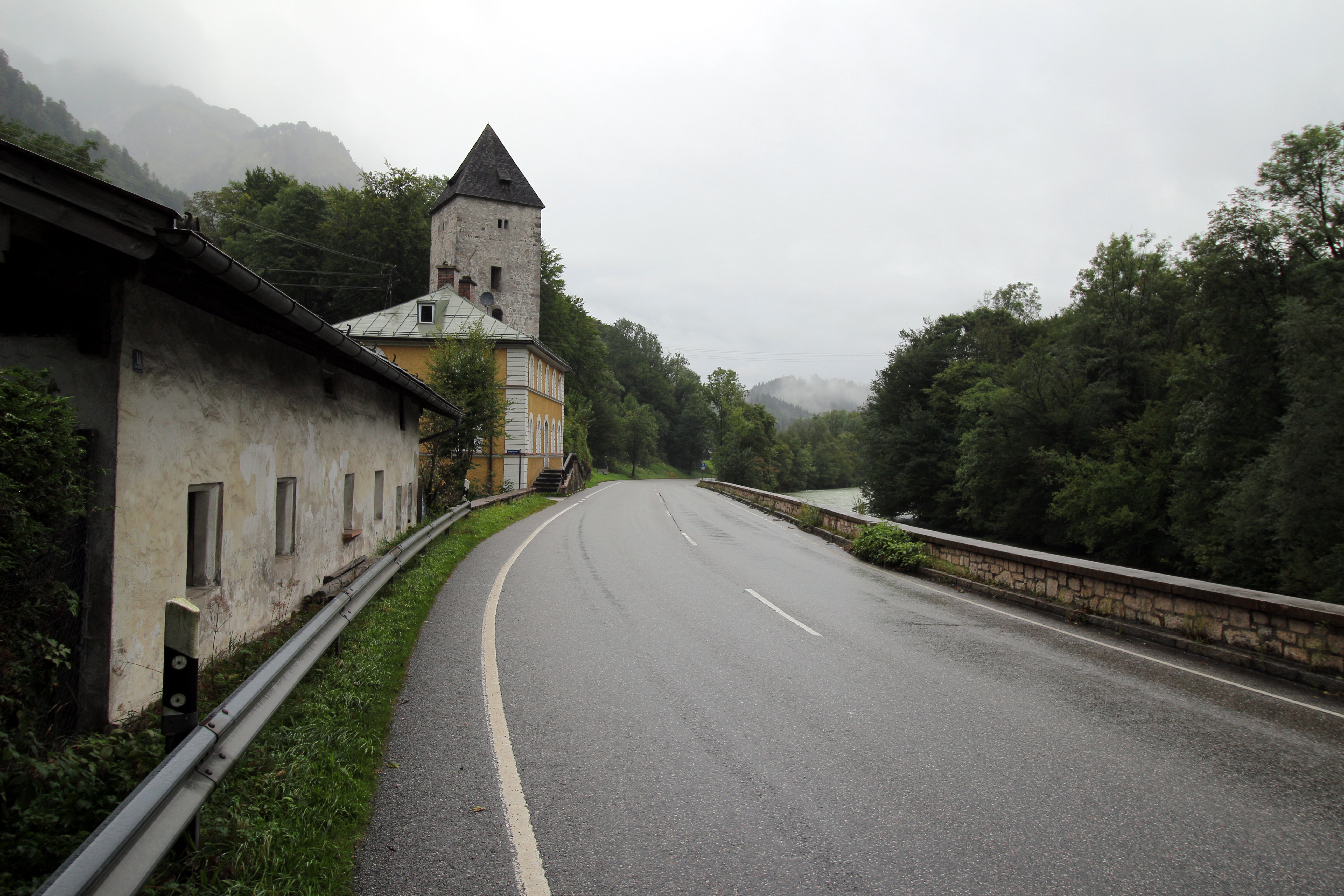 Schellenberger Turm an der B305 Richtung Salzburg. This is a photograph of an architectural monument.